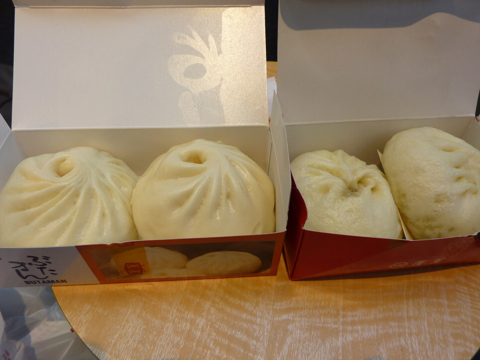 蓬莱本館（左）と551蓬莱（右）のテイクアウト豚まん